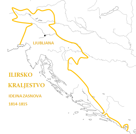 Idejna zasnova Ilirskega kraljestva